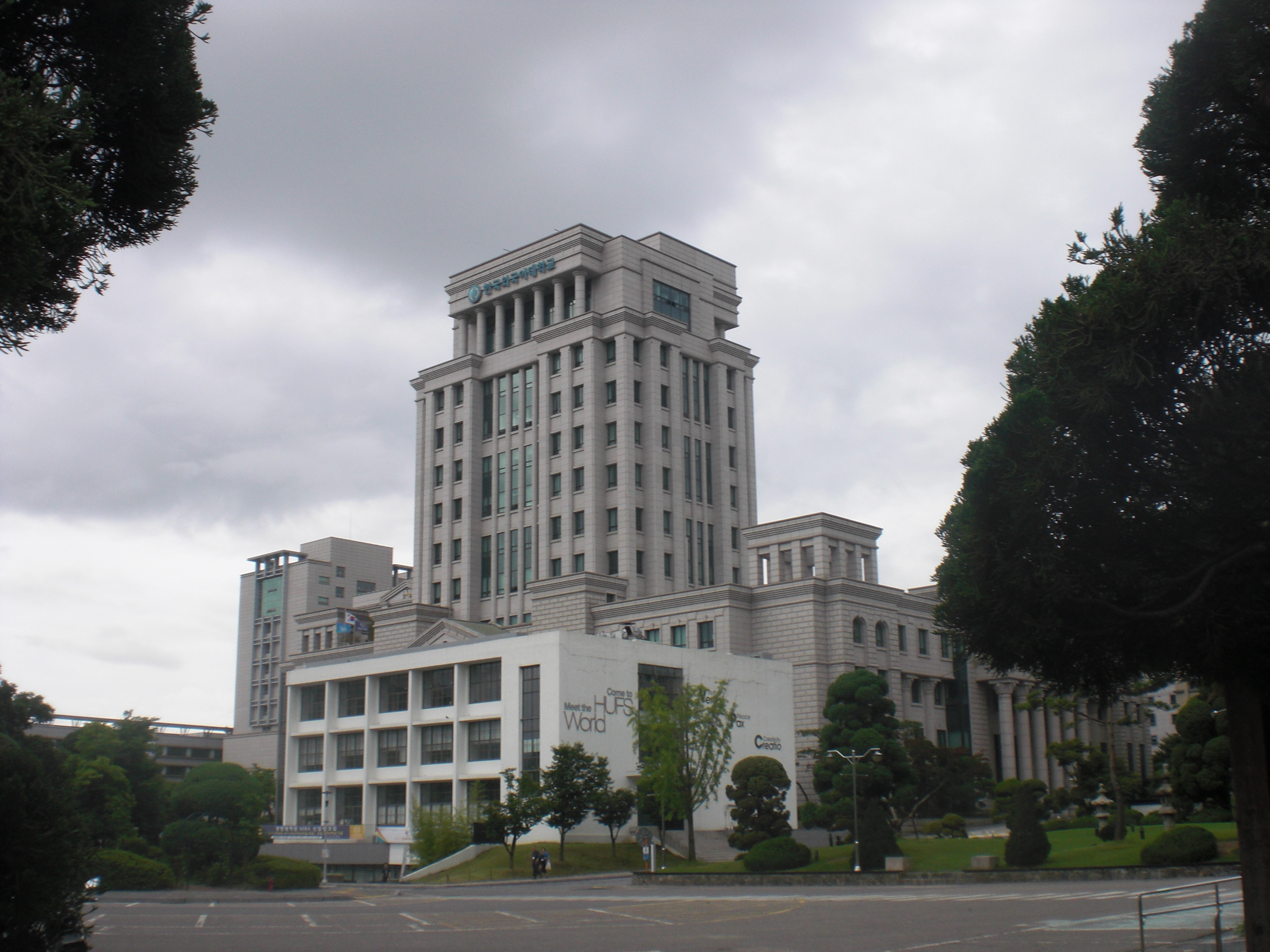 Hankuk Universitato